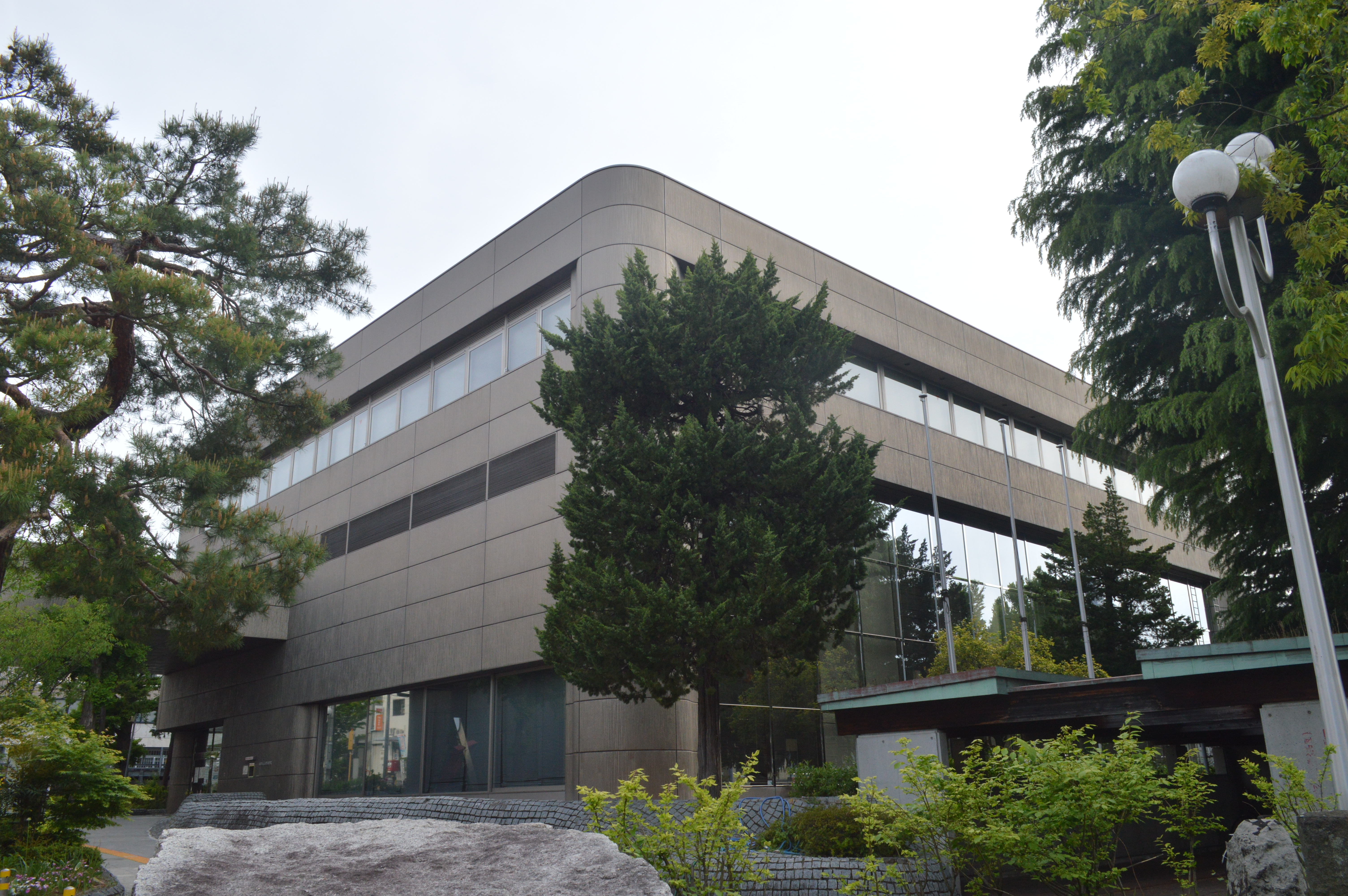 長野県長野市の長野市立図書館。